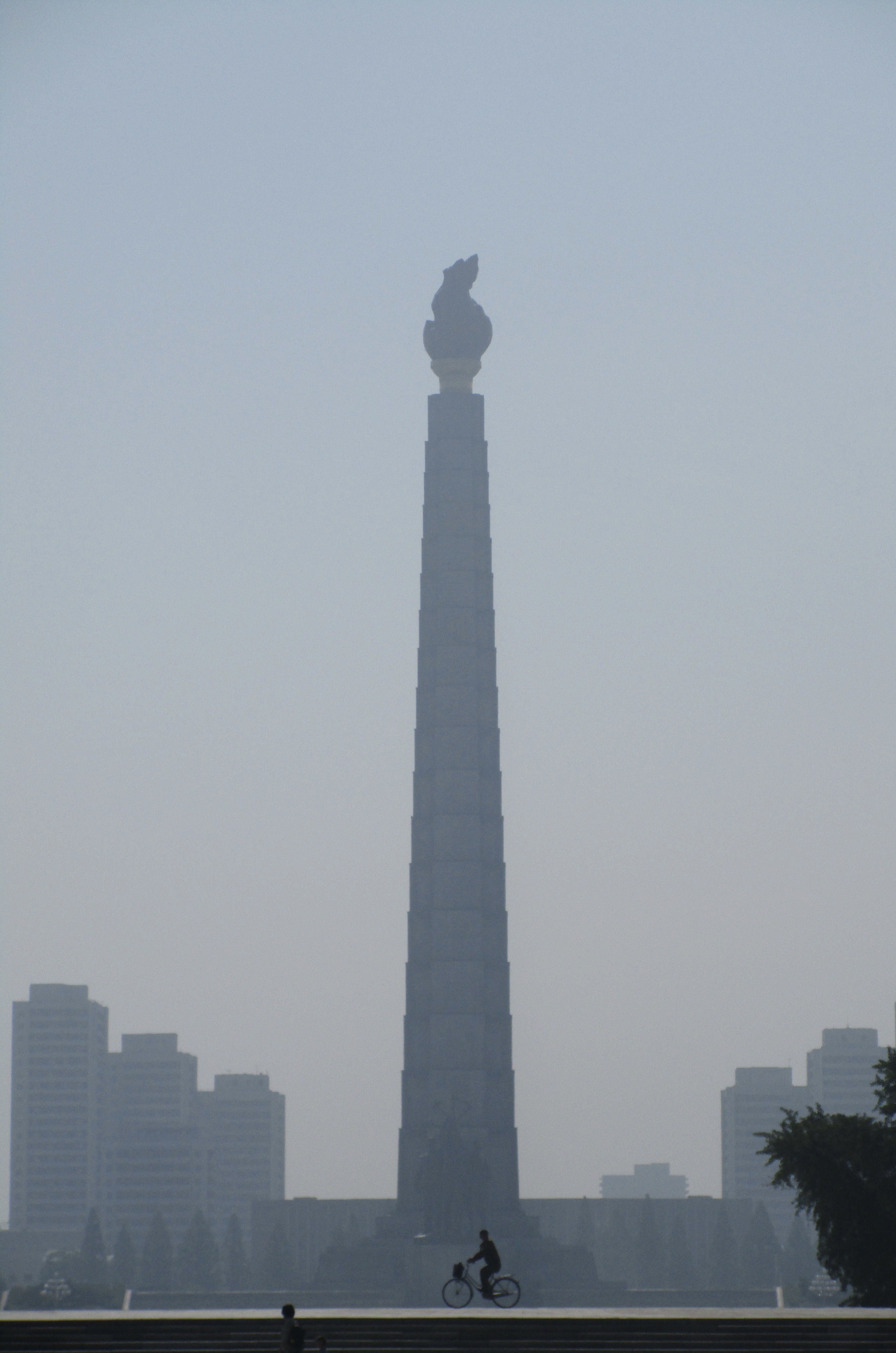 juche